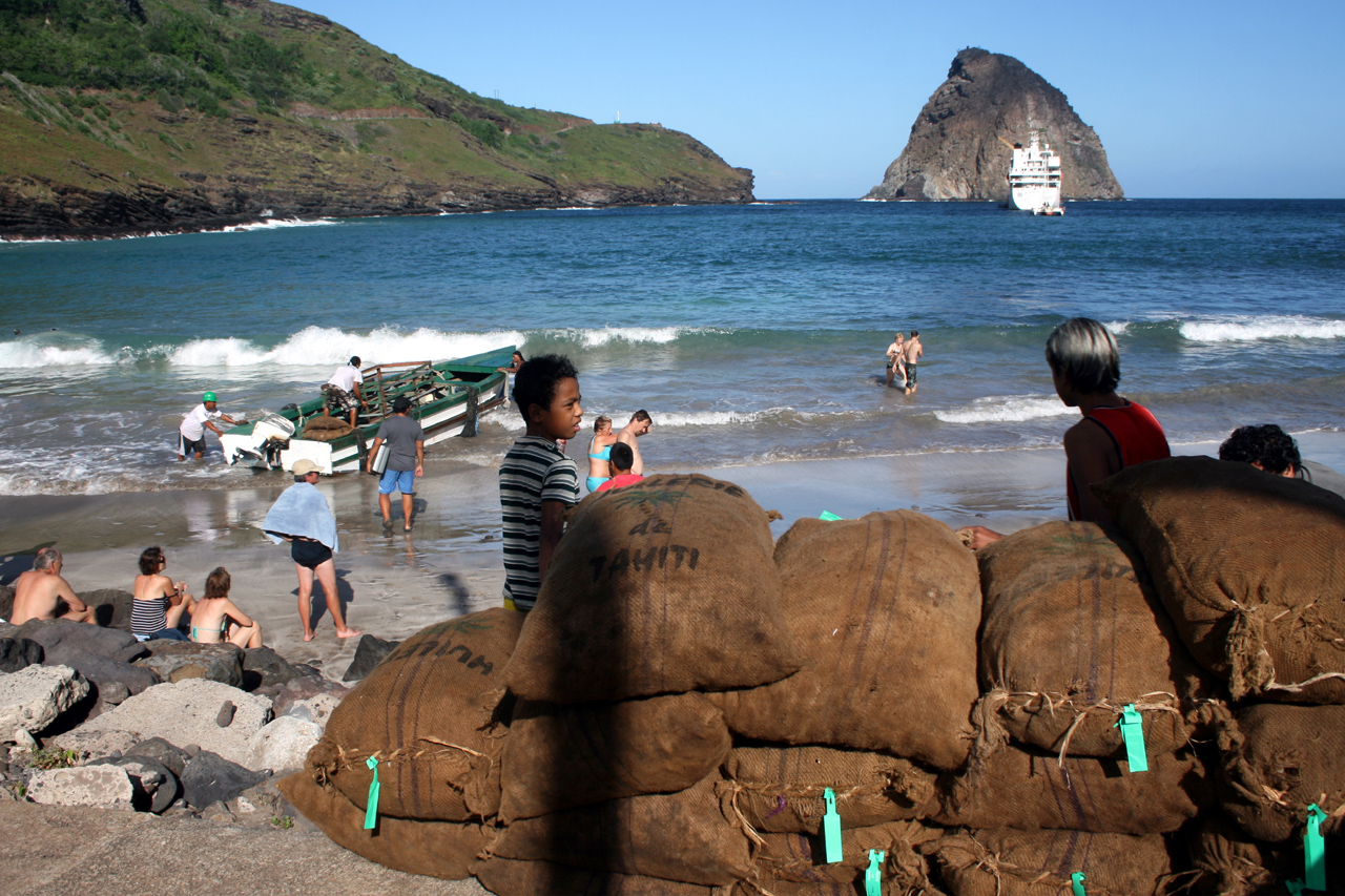 Chargement copra dans la baie de Hane